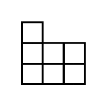 Diagramme de Ferrer de la partition 331